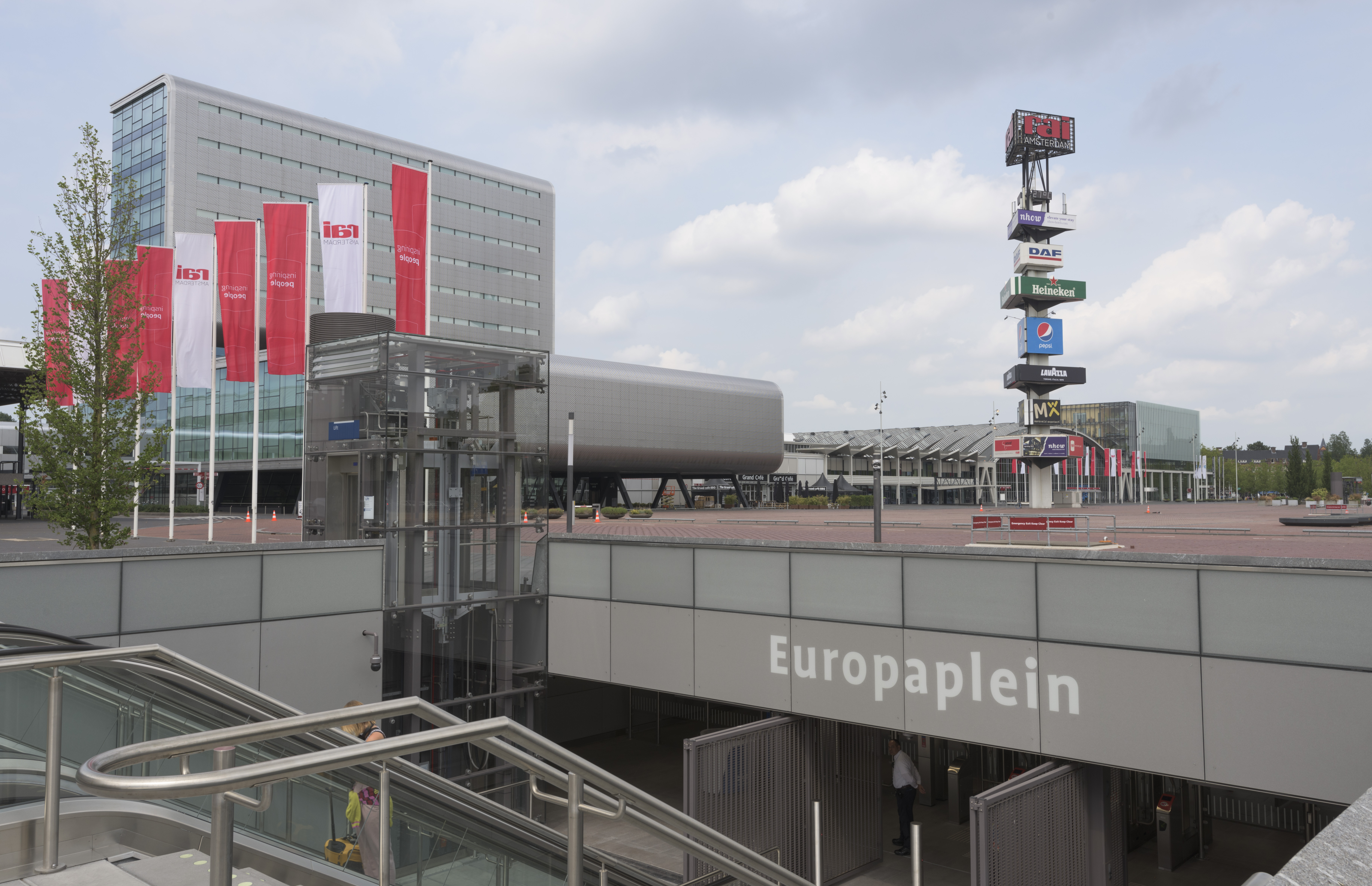 Metrostation Europaplein